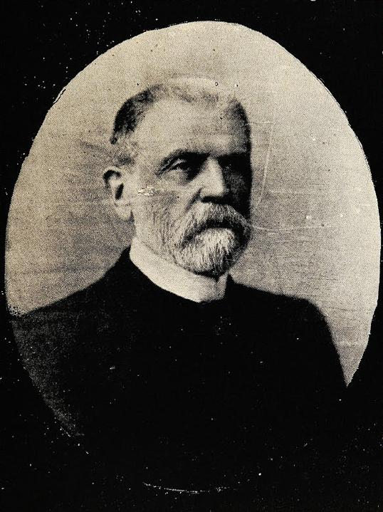 Adolfo Eastman Quiroga, minero, empresario y político liberal chileno. Nació en Ovalle, el 28 de octubre de 1835. Falleció en Santiago, el 9 de agosto de 1908. Hijo de Edmundo Eastman White y doña Tomasa Quiroga Darrigrande. Casado en 1858 con Manuela Urmeneta Quiroga, y en segundas nupcias el año 1884, con Carmen Mackenna Serrano. Educado en Inglaterra. En 1848 se dedicó a estudios mercantiles de alto nivel, debiendo trasladarse a Berlín, Alemania (1852), que poseía la mejor Escuela de Comercio de Europa. Estudió además minería en la Escuela de Minas de Sajonia. Se tituló de Ingeniero en Minas en 1856 e Ingeniero Comercial en 1858.